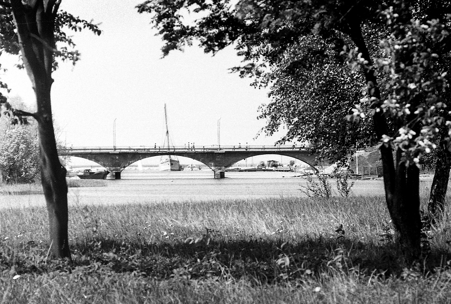 Pirita sild Tallinnas 75